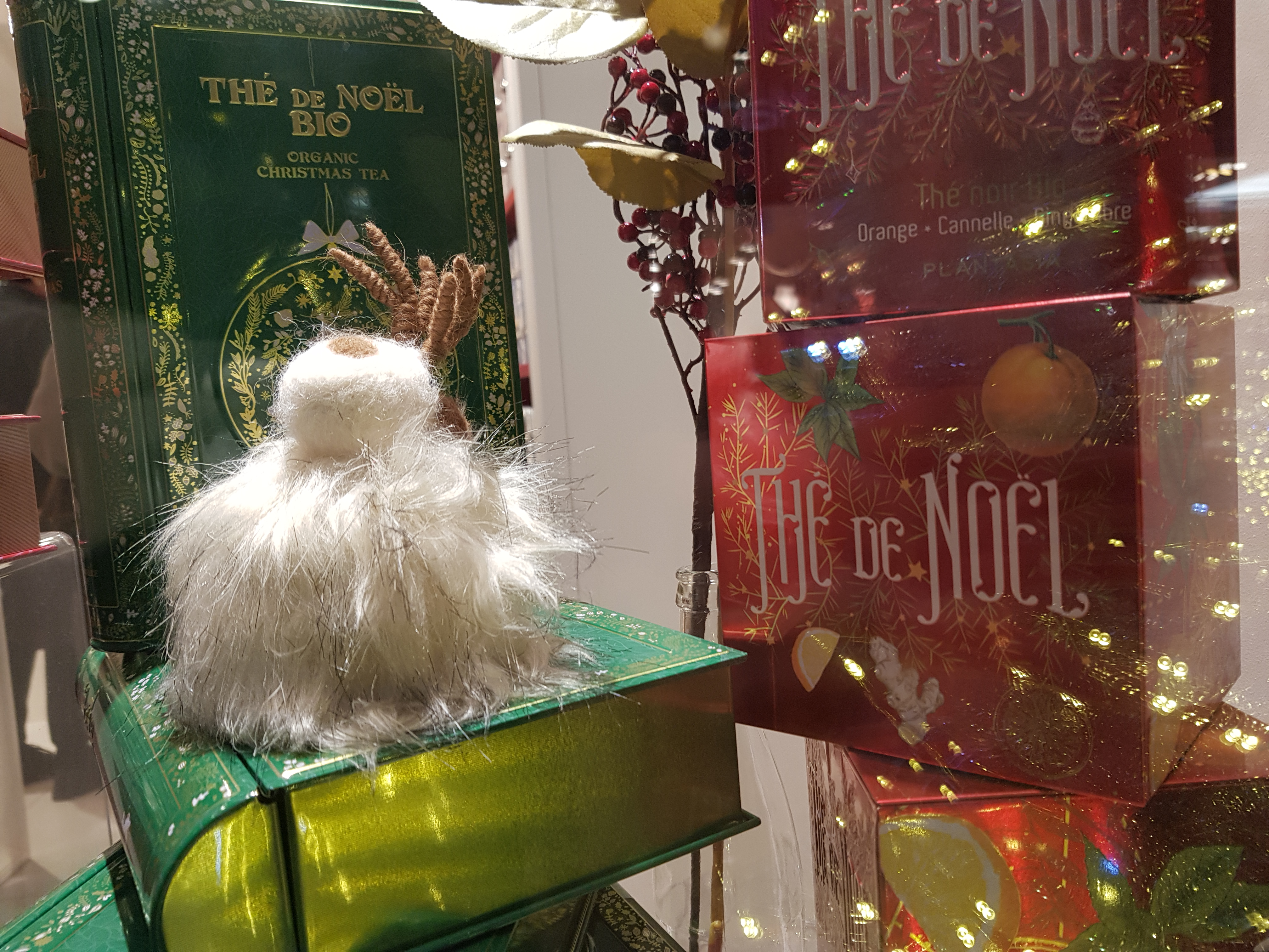 thé de Noël